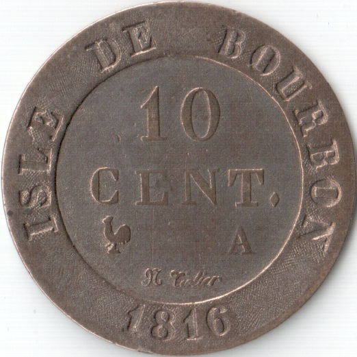 10 сантимов 1816 Остров Бурбон - 10 cent. 1816 Isle de Bourbon. Оригинал находится по адресу (The original is located at)